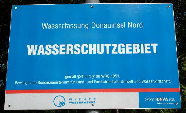 Hinweisschild der Wiener Wasserwerke MA31